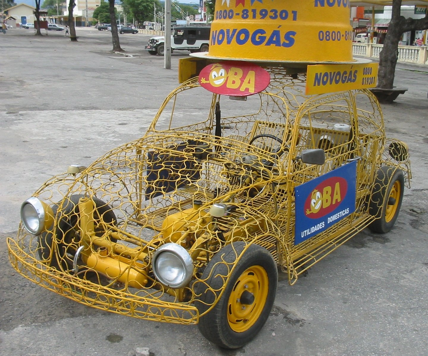 Caruaru (Pernambuco), Brasil. Fusca bastante modificado e apelidado de Ximbica. Caruaru (Pernambuco), Brazil. A Volkswagen Beetle know as Ximbica.